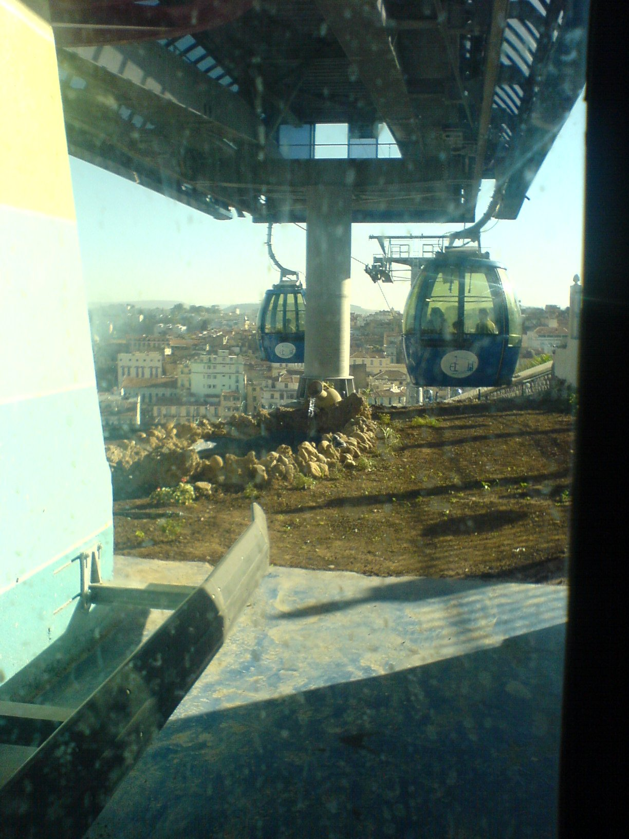 Vue à partir de la cabine dans la station de l'Hopital Ben Badis de Constatine